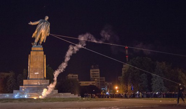 Пам'ятник В.І. Леніну (зруйнований), Харків, майд. Свободи (кол. пл. Ф.Е. Дзержинського)